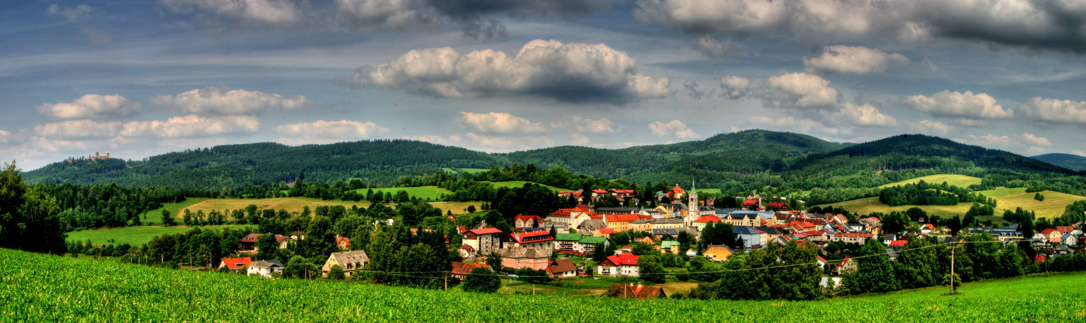 Panorama Kašperských Hor.